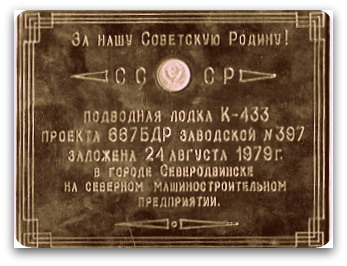 Закладная доска подводной лодки К-433 сторона №2 The embedded Board a submarine K- 433 (side №1)